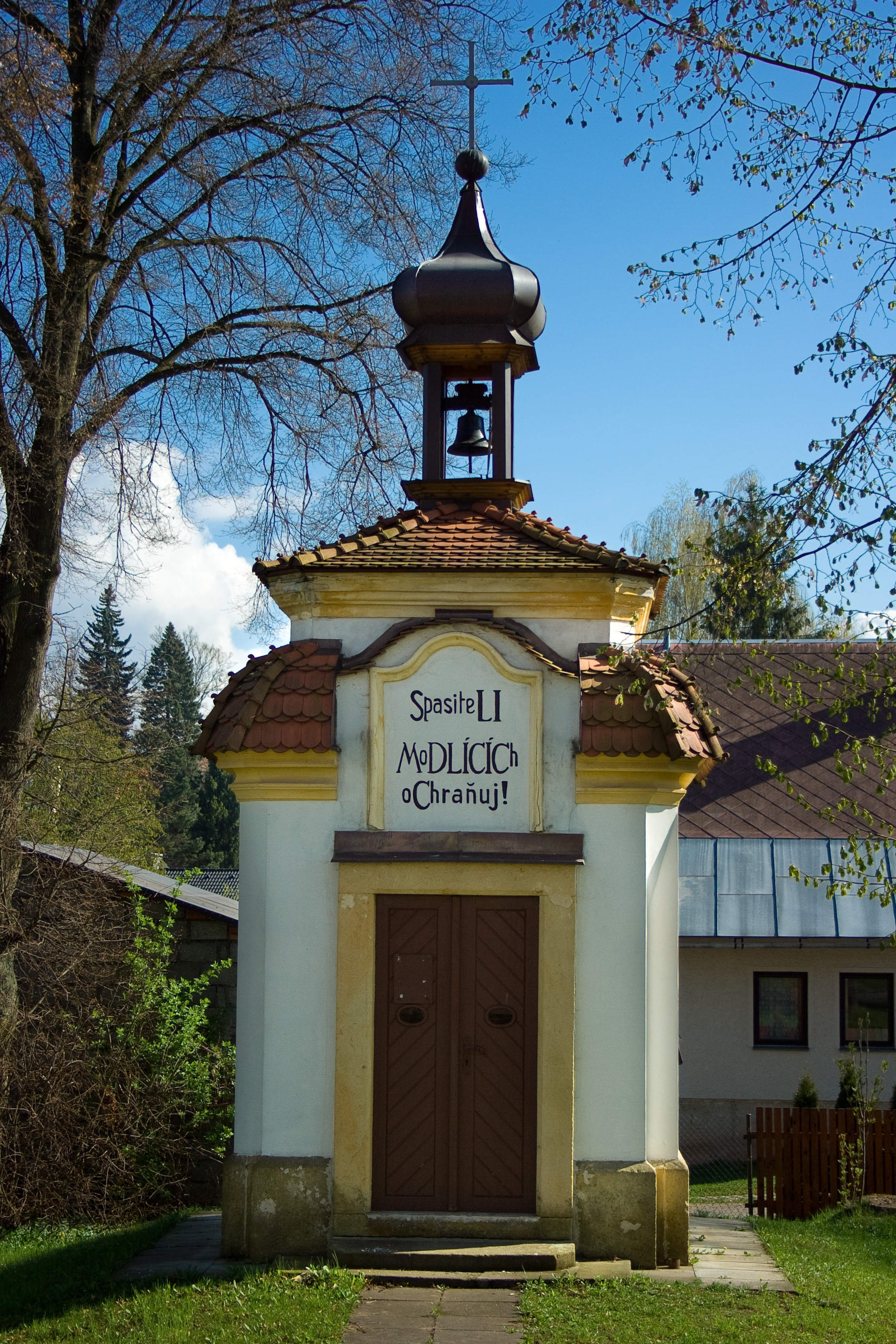 Kaple Božího těla se zvonem (Jilemnice), V Jilmu, Roztocká, Jilemnice